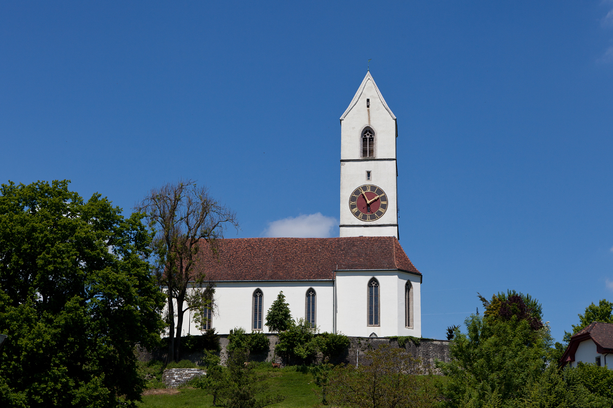 Reformierte Kirche in Suhr (Kulturgut, Liste B)